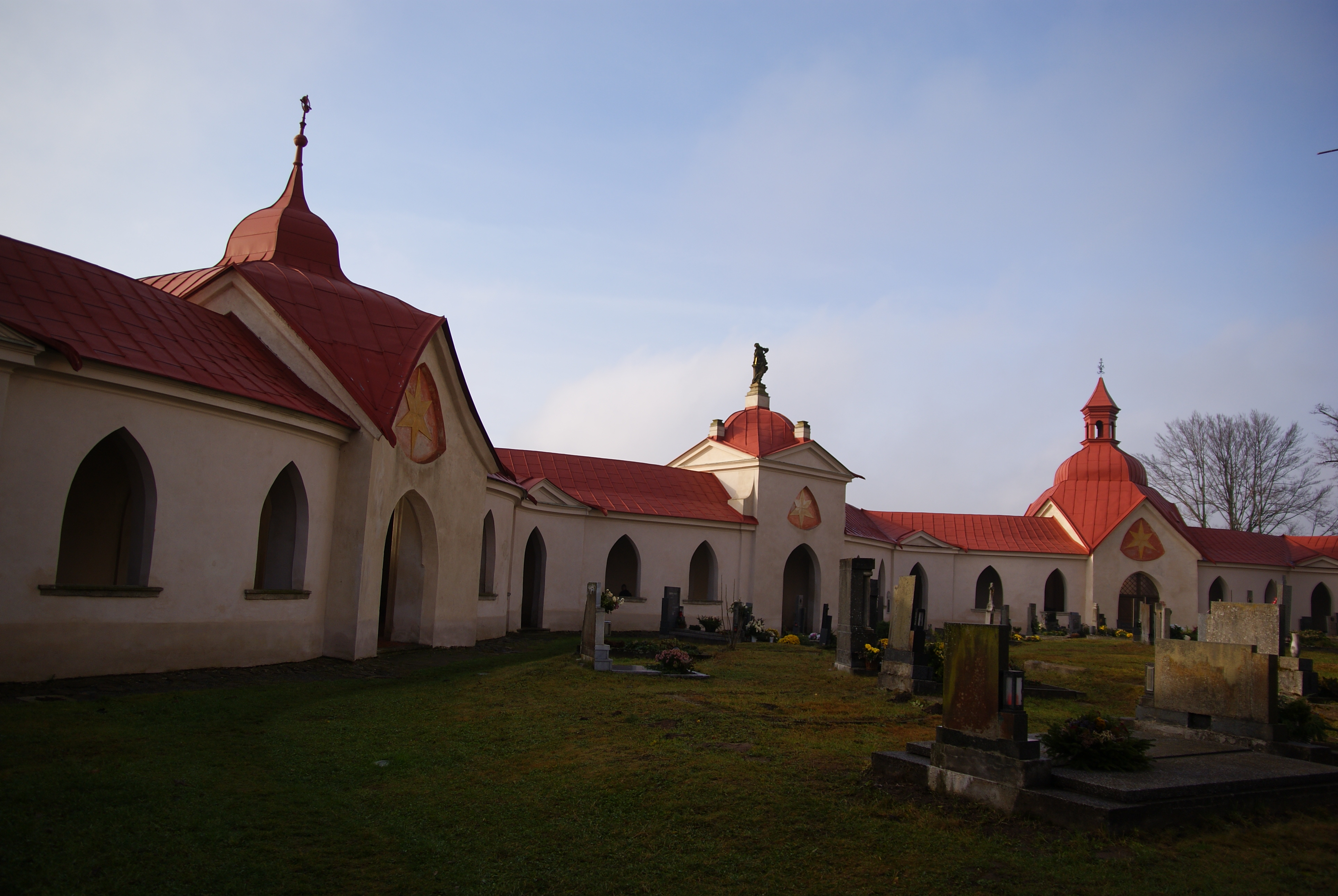 Kostel sv. Jana Nepomuckého (Žďár nad Sázavou), Zelená hora, Žďár nad Sázavou